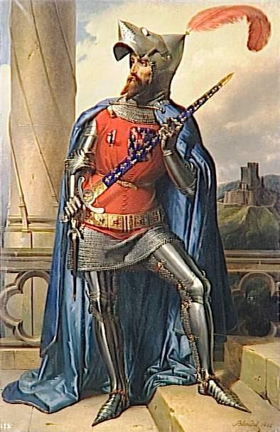 Jacques de Bourbon, comte de La Marche, Connétable de France en 1354